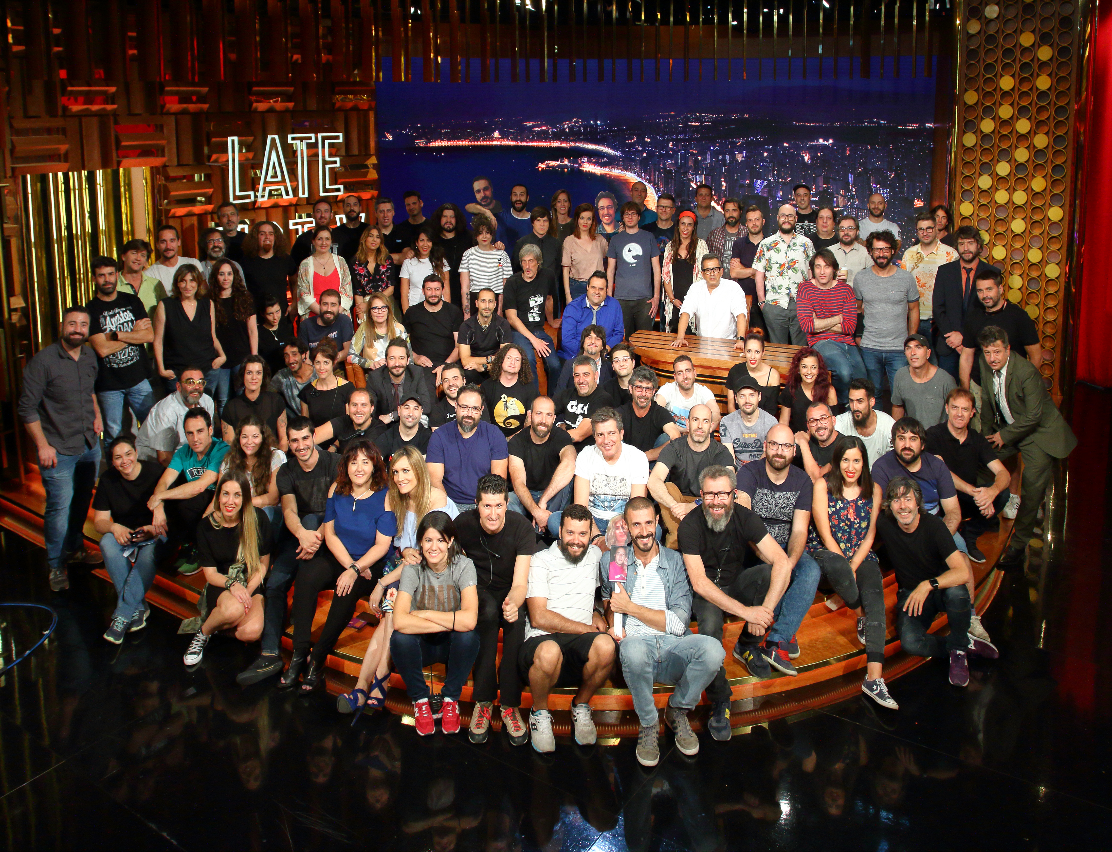 Late Motiv, equipo en el plató del programa, para Wikimedia España